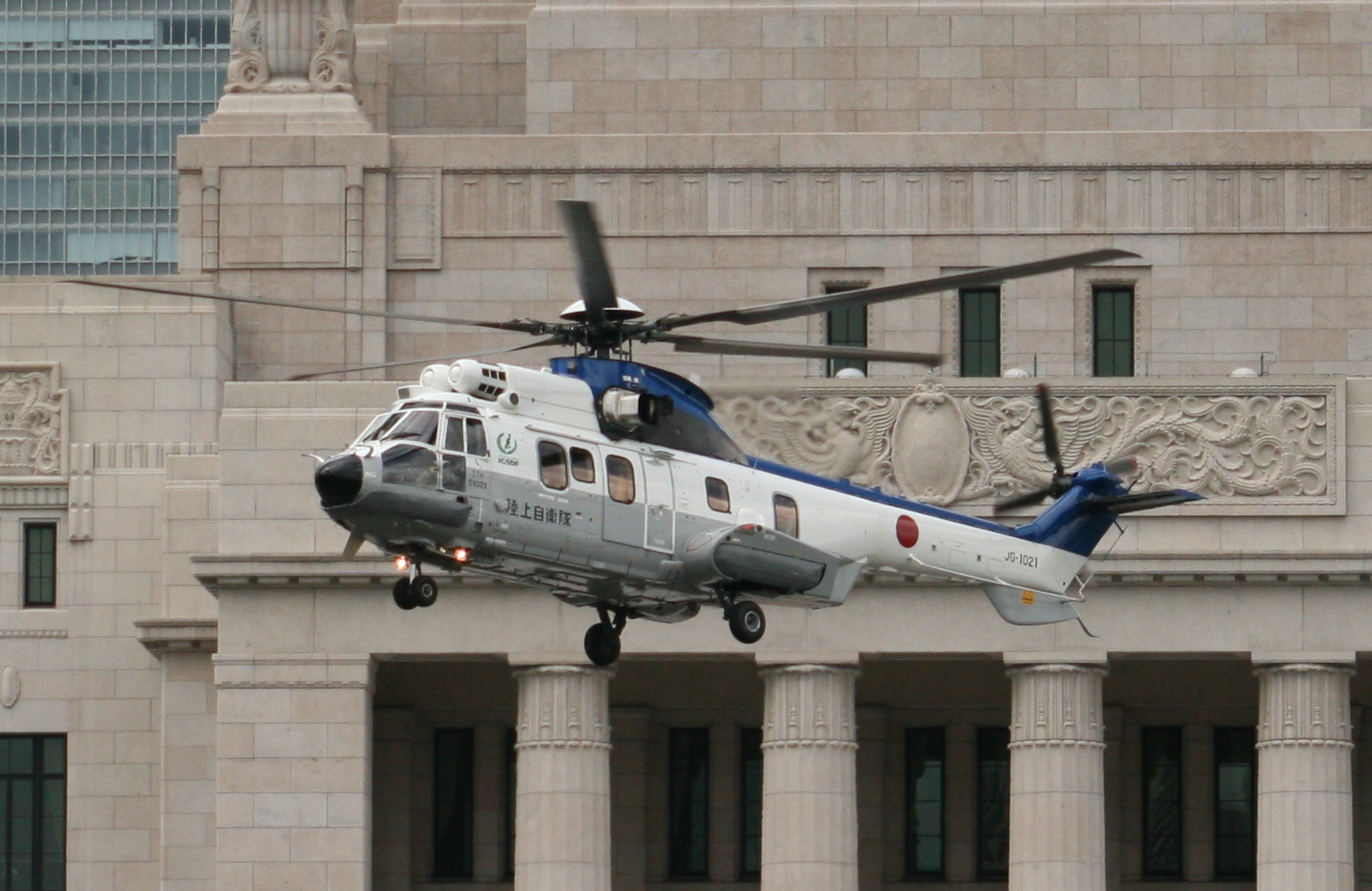 略称：EC-225LP [乗員]2人（P）＋20人 ○機体 [全長]19.5m（胴体長16.8m） [全幅]16.2m（胴体幅3.96m） [全高]4.97m [ローター直径]16.2m [製作]仏国ユーロコプター社 ○エンジン [名称]マキラ2A [出力]2,167HP×2 [製作]仏国ターボメカ社 [最大全備重量]11,000kg [最高速度]約320km/h AS-332Lの後継機として、平成18年から取得。主として、国賓、内閣総理大臣等の輸送に使用される。AS-332Lに比し、メインローターが4枚から5枚になり、胴体が長くなったことで機内も広くなり、輸送人員が増えた。